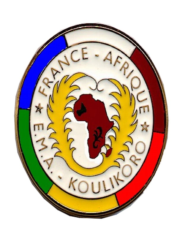 Brevet Officiers et CT2 Ecole Militaire d'Administration de Koulikoro